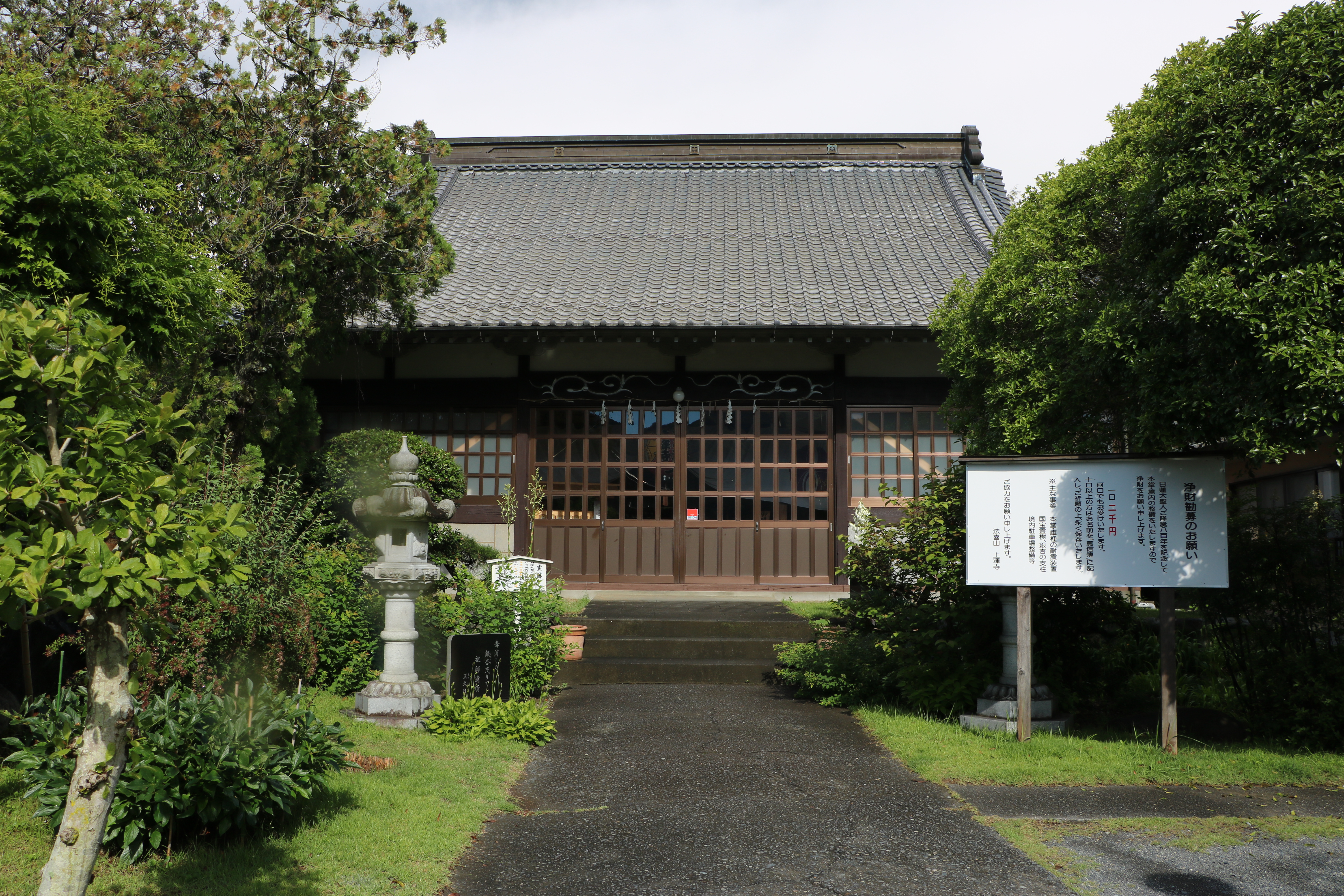 上沢寺本堂（山梨県南巨摩郡身延町）